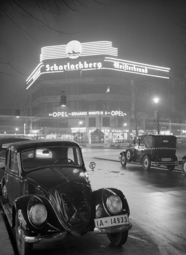 Berlijn. Nachtopname in de buurt van de Kurfurstendamm met lichtreclames van Opel en Scharlachberg met op de voorgrond geparkeerde auto's.